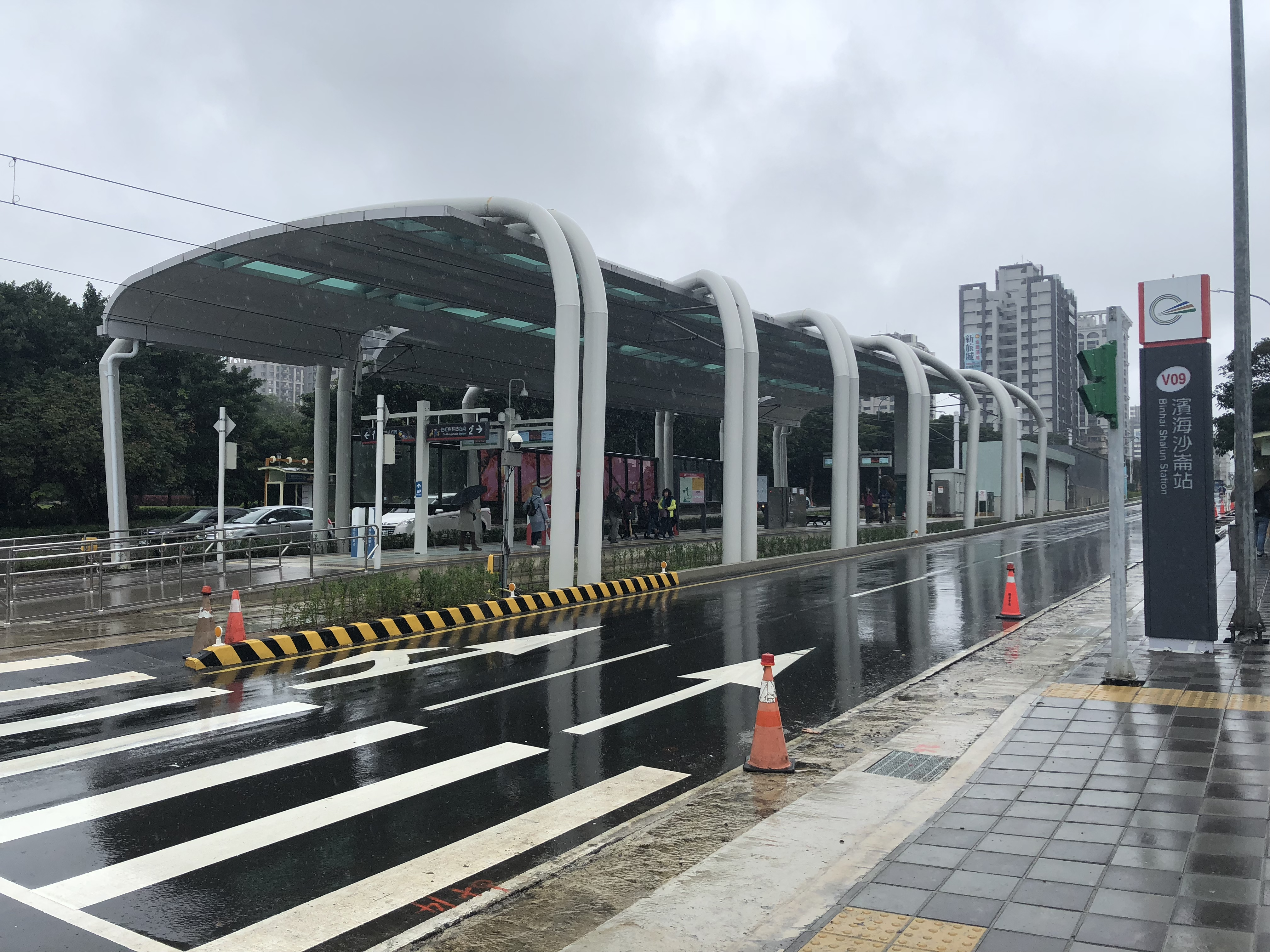 濱海沙崙站